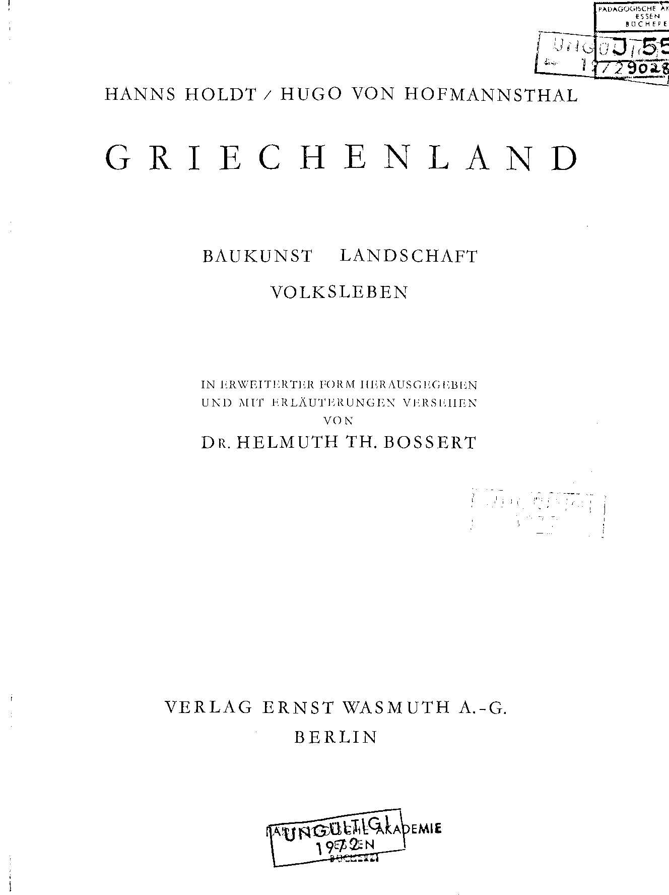 Hanns Holdt: Griechenland. Baukunst, Landschaft, Volksleben. Einleitung Hugo von Hofmannsthal. Erweiterte Auflage. Erläuterungen Helmuth Th. Bossert. Berlin : Ernst Wasmuth, 1928